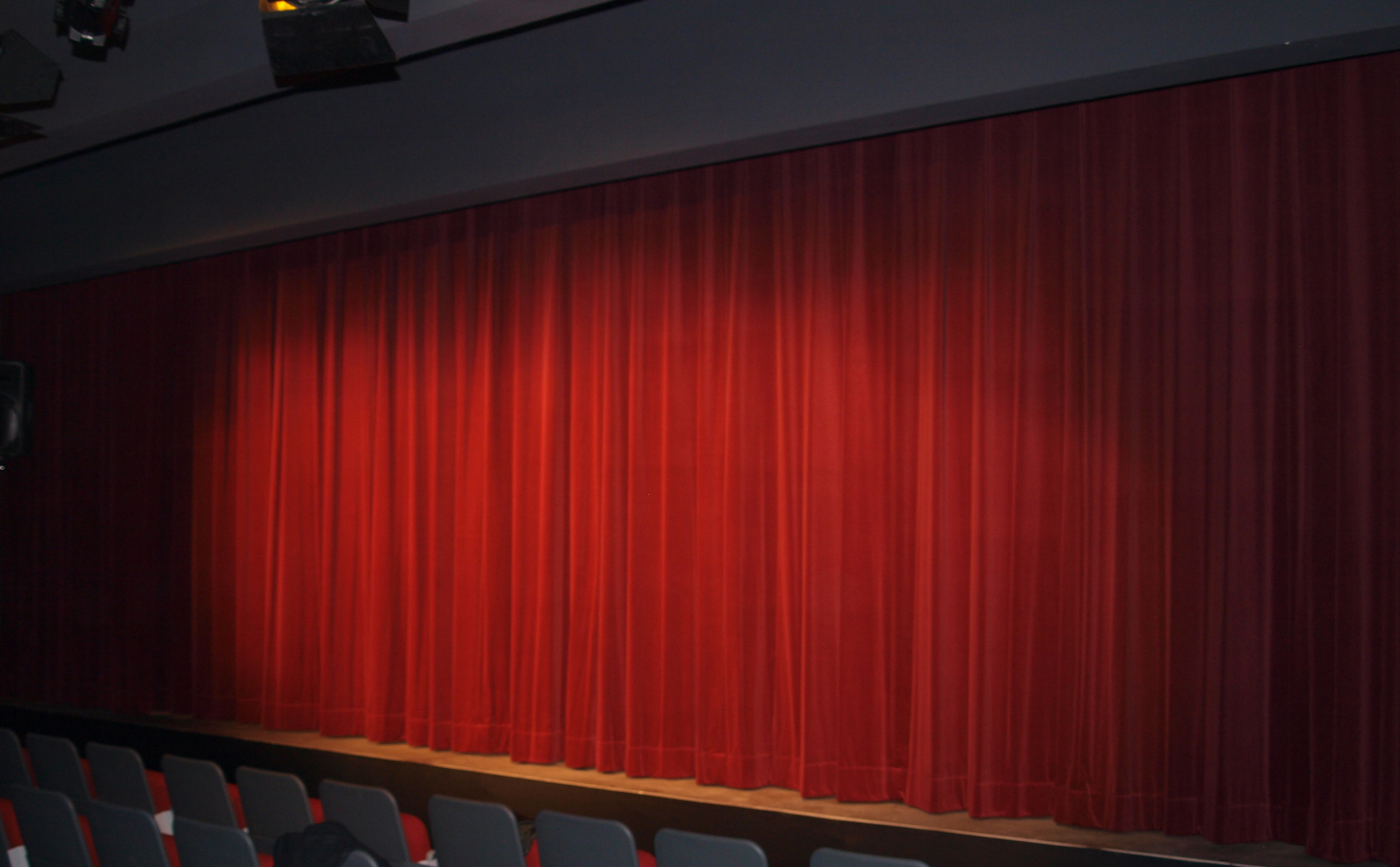 Theatersaal des Theaters am Meer - Niederdeutsche Bühne Wilhelmshaven